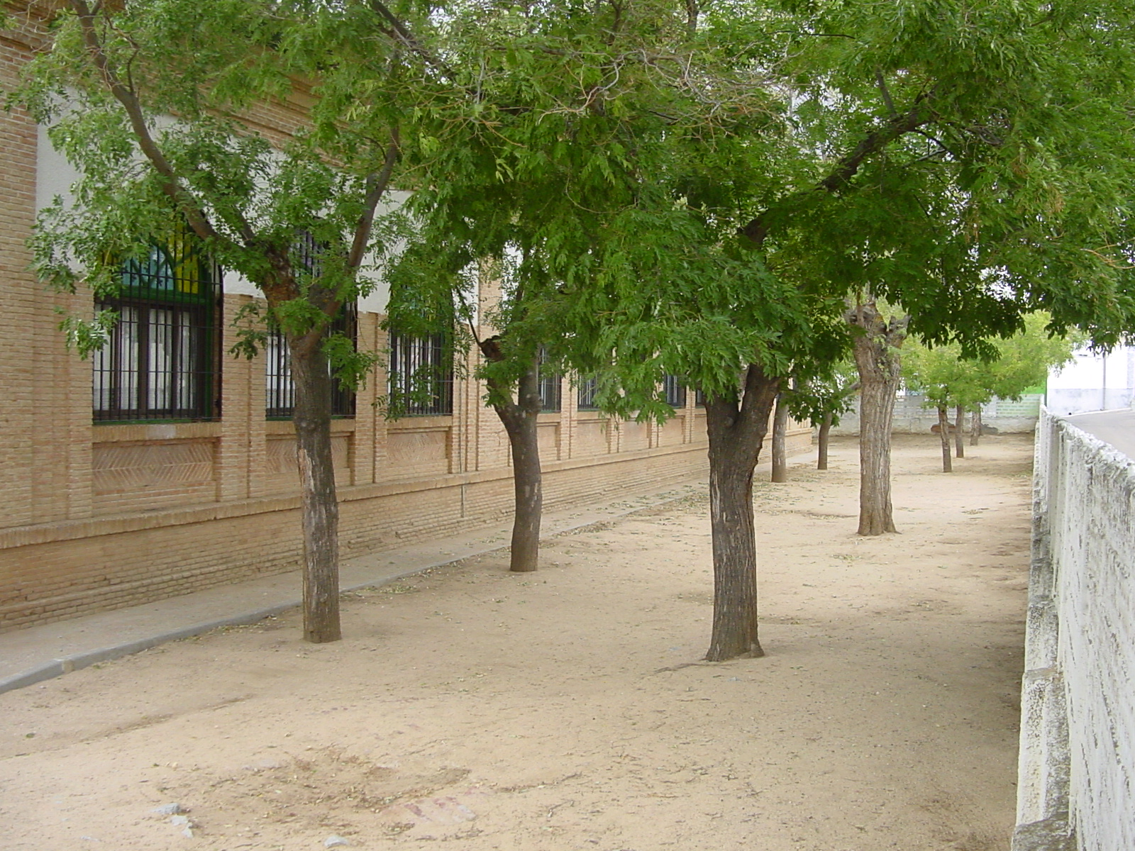 Escuelas públicas de Guadamur (Toledo), construidas durante la II República (1935).